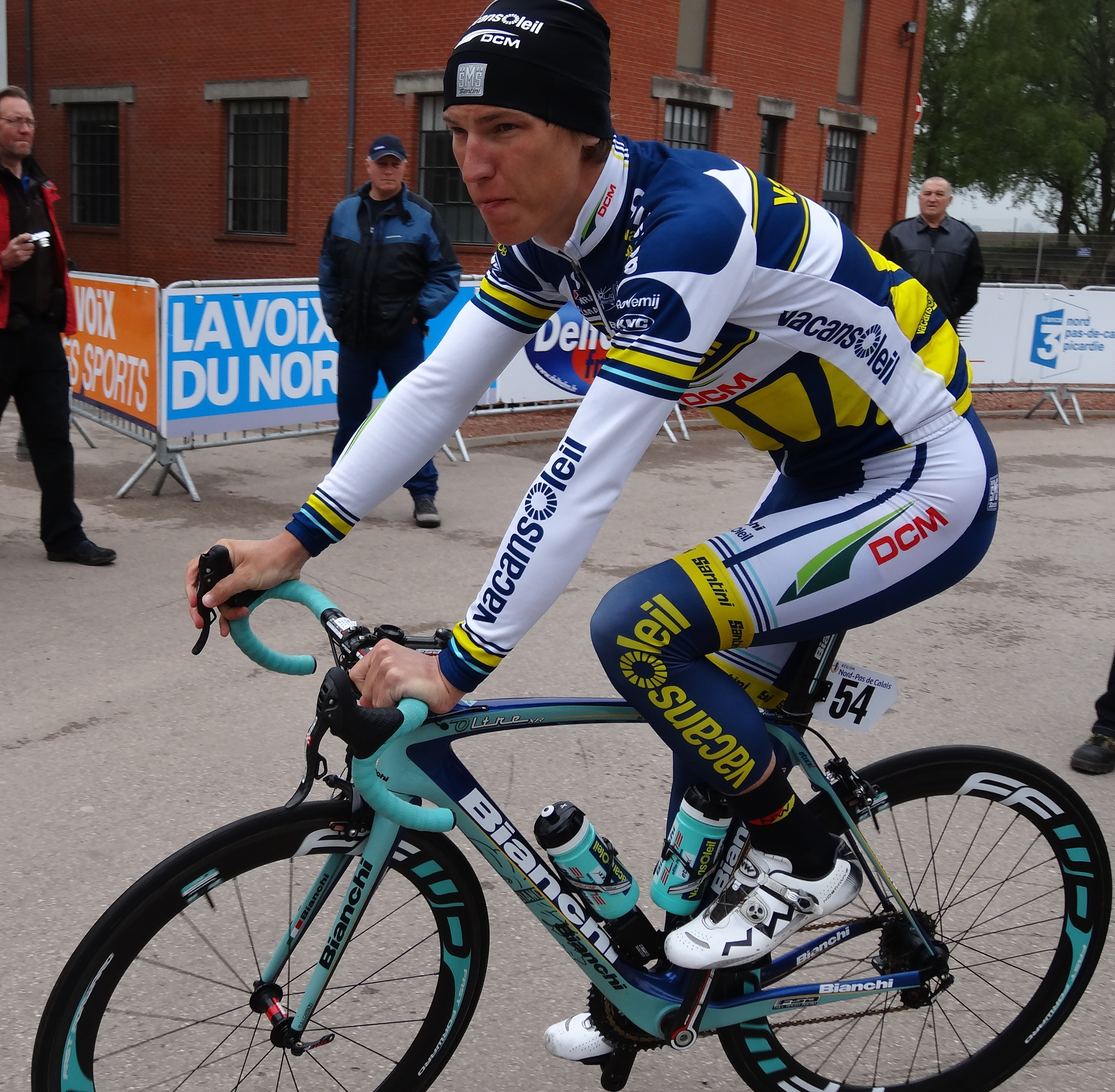 Reportage photographique réalisé le jeudi 2 mai 2013 au départ de la deuxième étape de l'édition 2013 des Quatre jours de Dunkerque au Centre historique minier de Lewarde, Nord, Nord-Pas-de-Calais, France, dans le bassin minier du Nord-Pas-de-Calais.Depicted person: Nikita Novikov